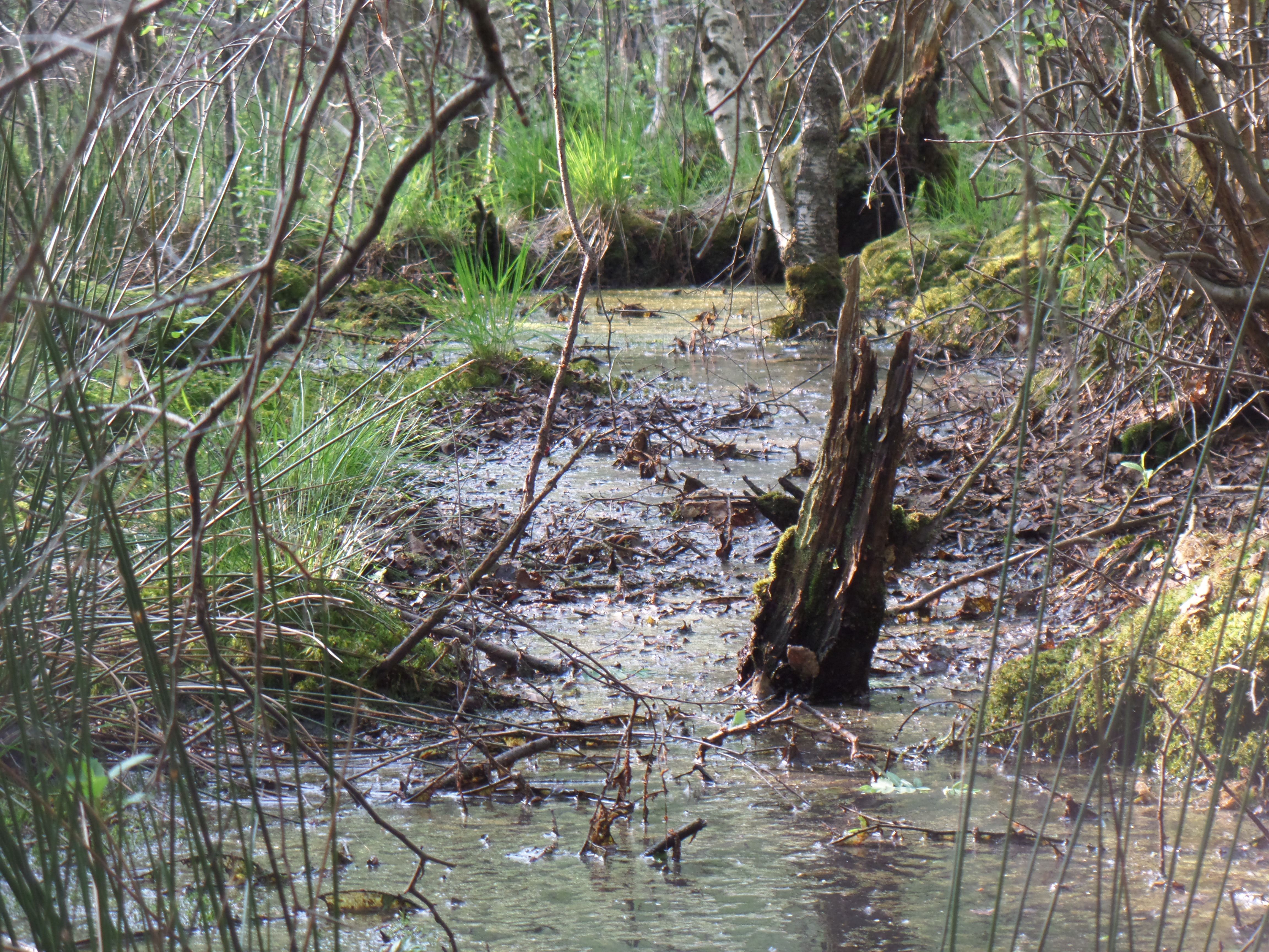 Alter Entwässerungskanal im Naturschutzgebiet Dievenmoor (NSG WE 218)